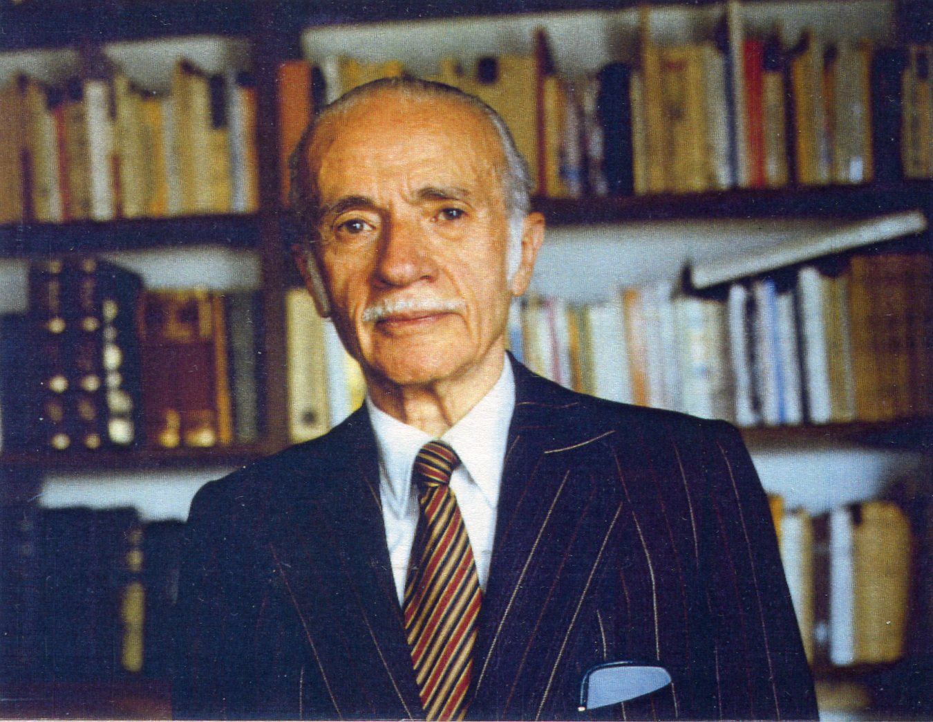 Alfredo Pareja Diezcanseco (1908-1993), Ecuadorian novelist and diplomat (Photo, 1990)